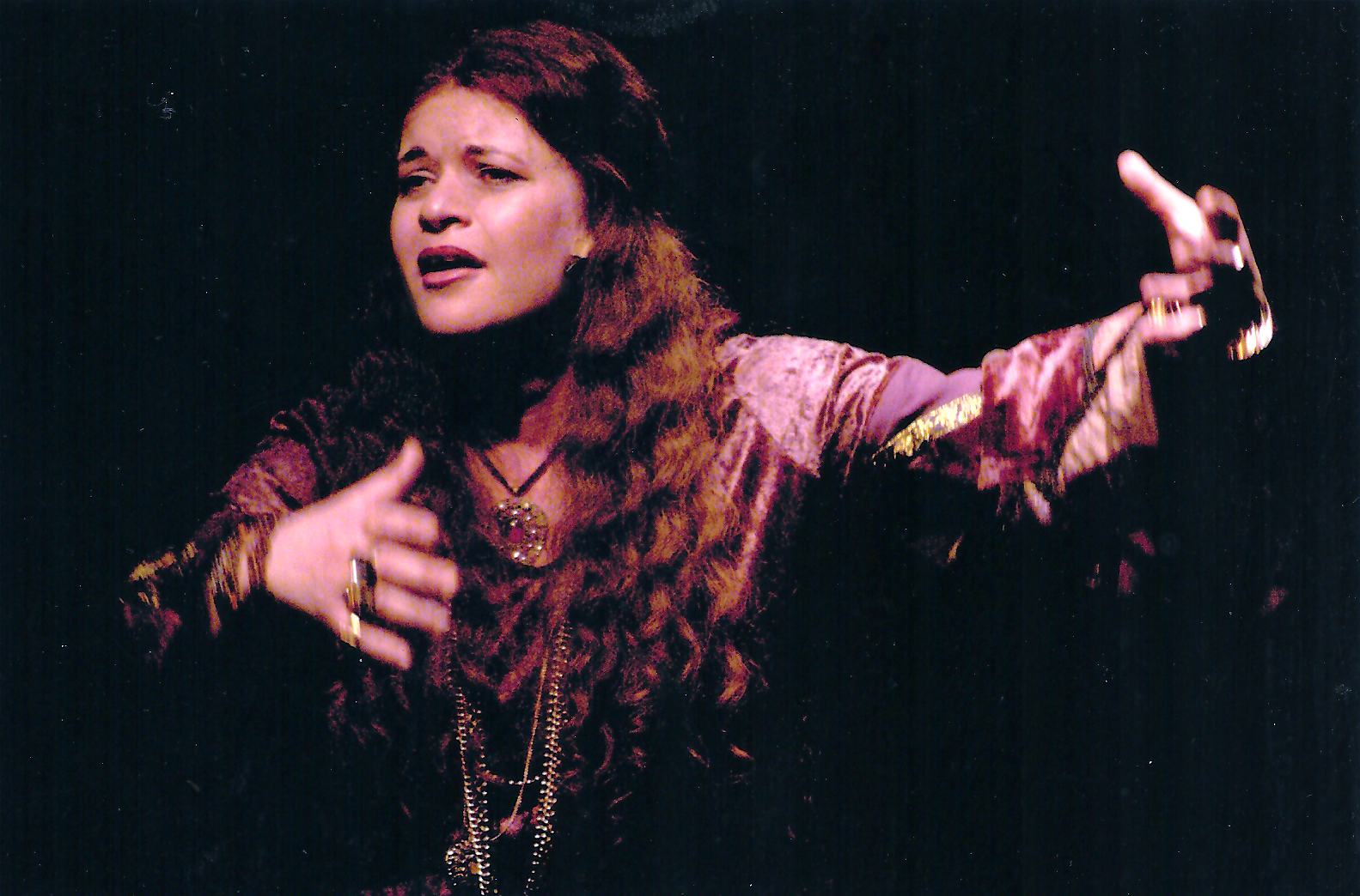 אורנה רוטברג כג'ניס ג'ופלין צילום ז'ראר אלון